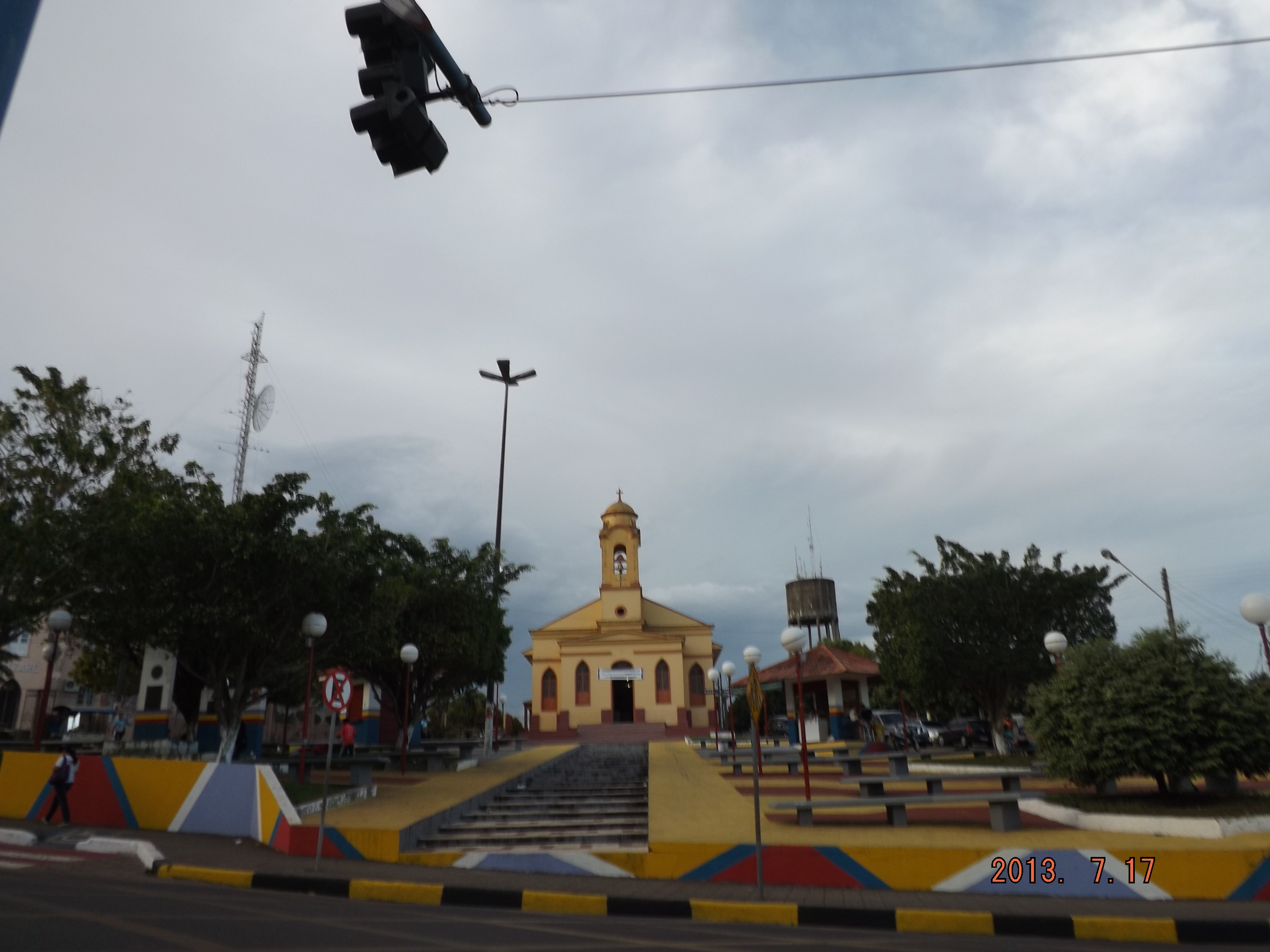 PRACA DE MANACAPURU AM